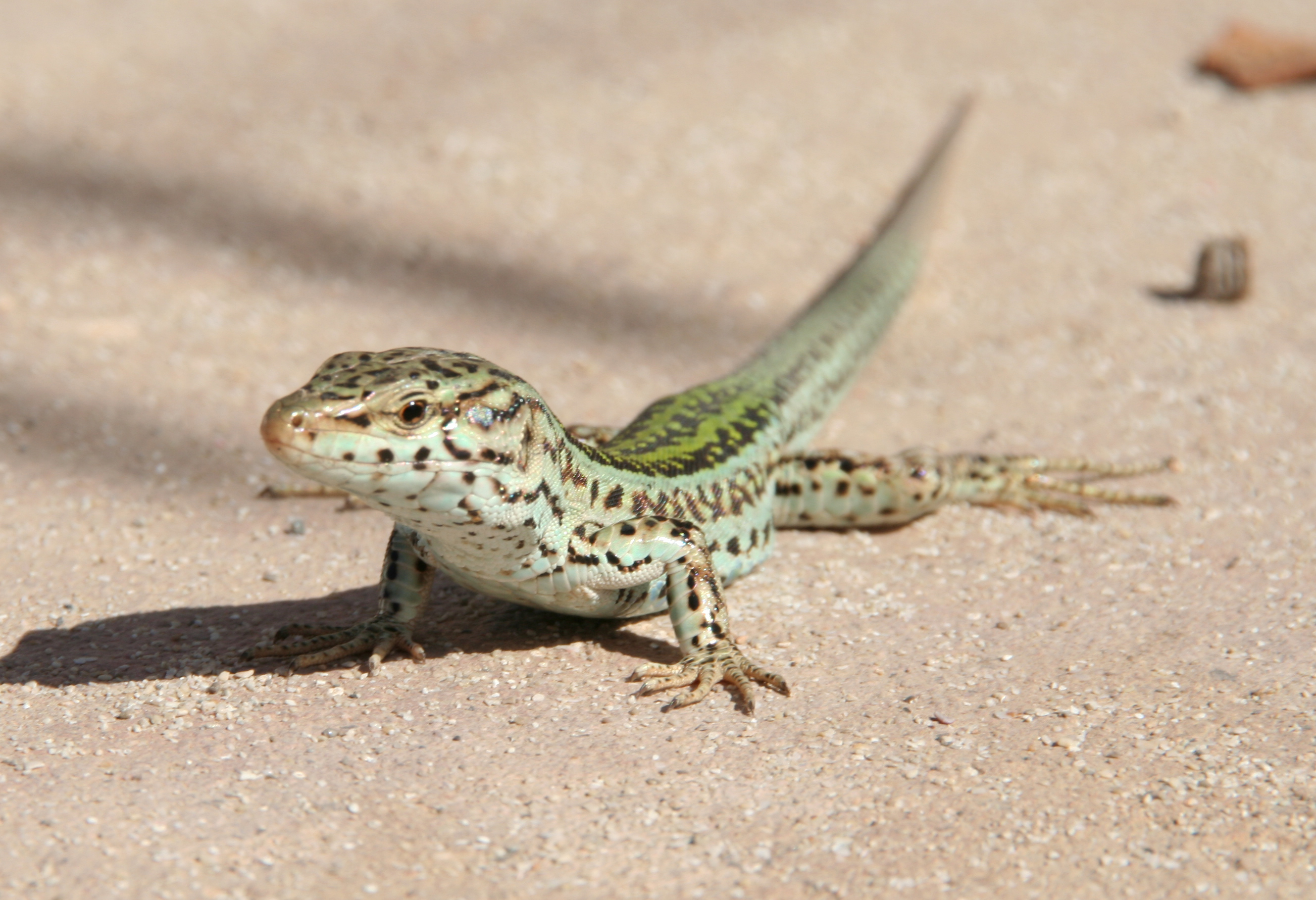 Sargantana de Formentera Podarcis pityusensis formenterae